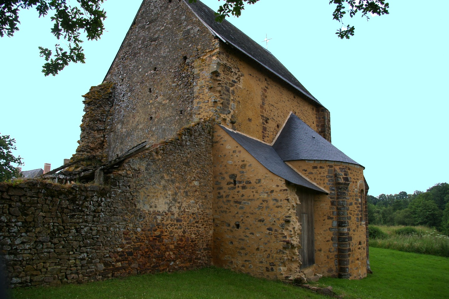 Chapelle de l'ancien,ne abbaye d'Etival-en-Charnie (Sarthe)